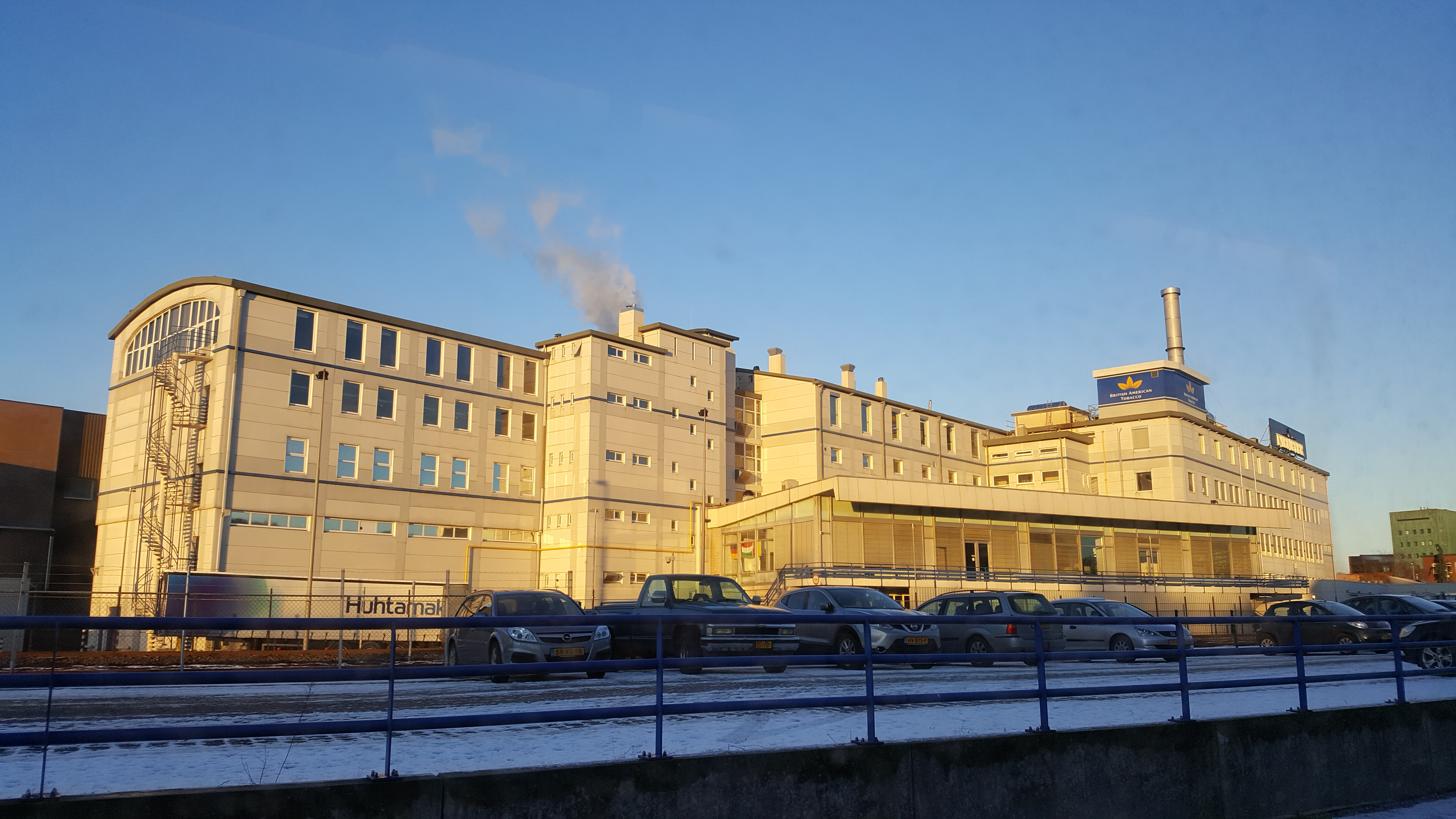 Theodorus Niemeyerfabriek in Groningen